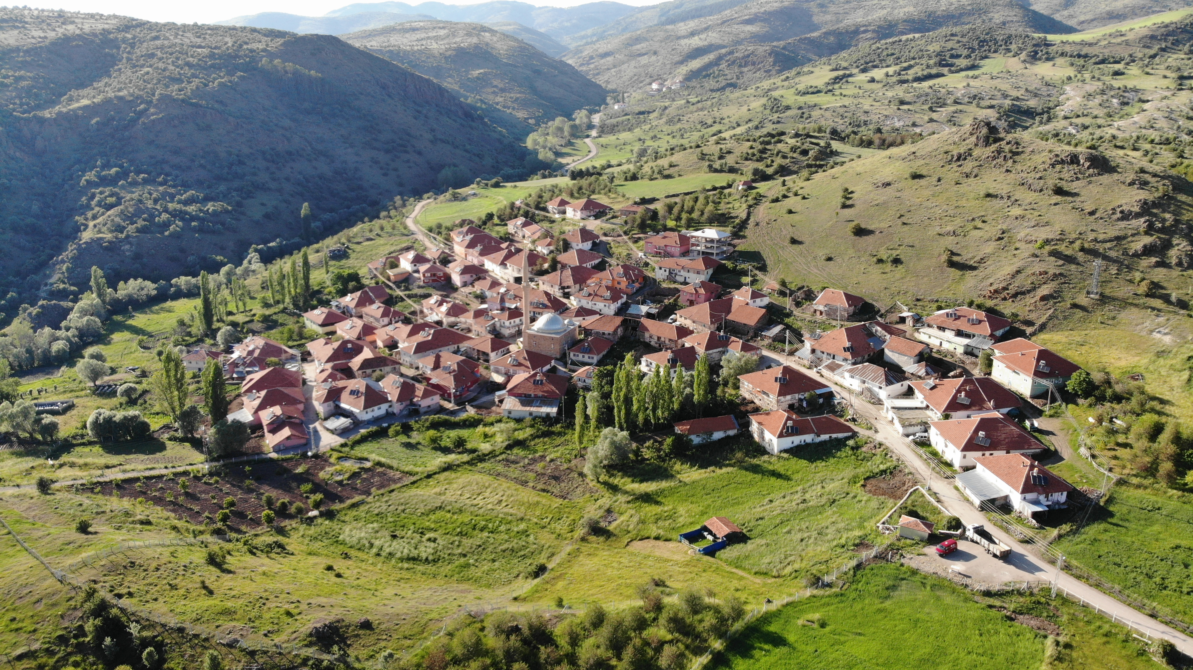 köyün havadan görüntüsü